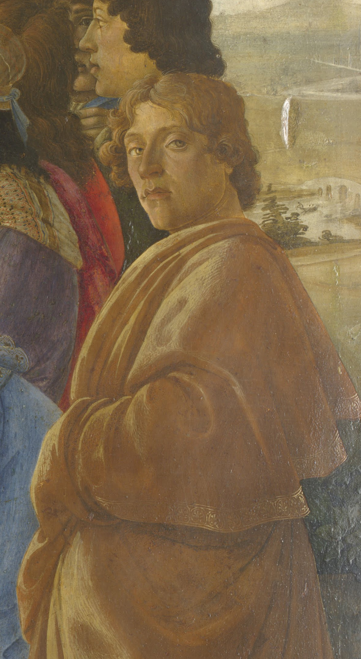 Vermutliches Selbstporträt Sandro Botticellis aus dem Zanobi-Altar (Uffizien)